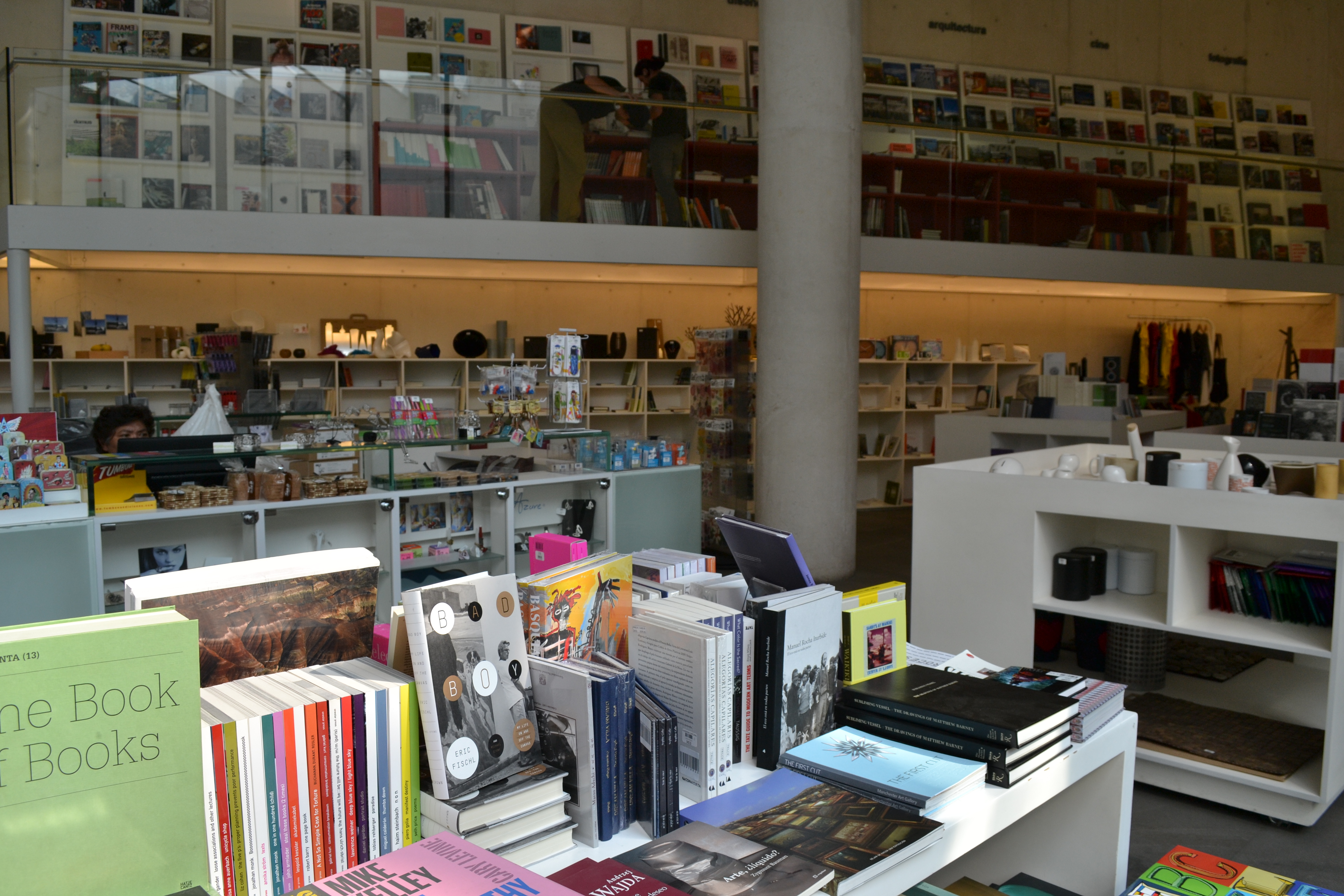 Venta de libros dentro del MUAC ubicado en Ciudad Universitaria